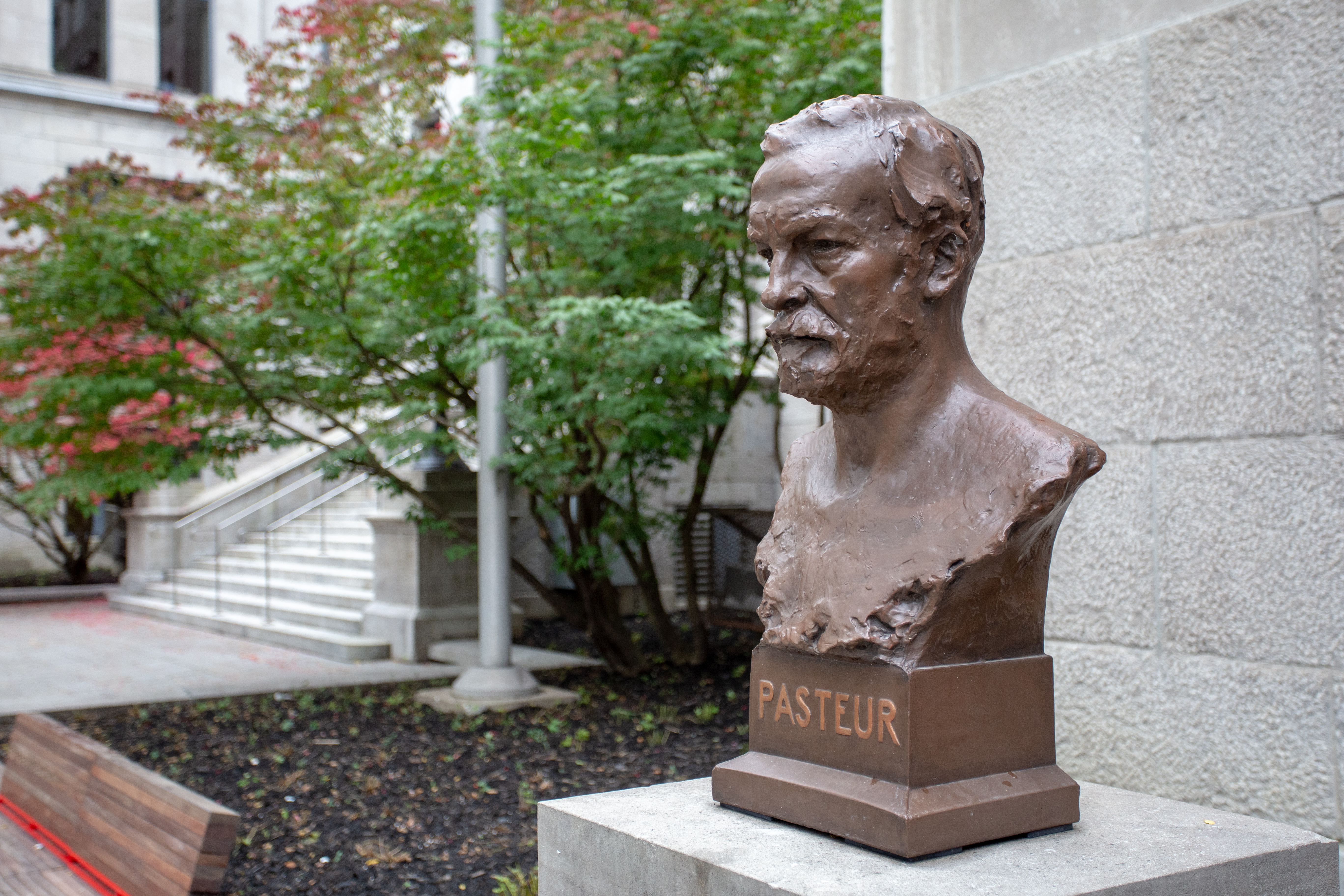 D'après Naoum Aronson, Buste de Louis Pasteur, place Pasteur, campus de l'université du Québec à Montréal.